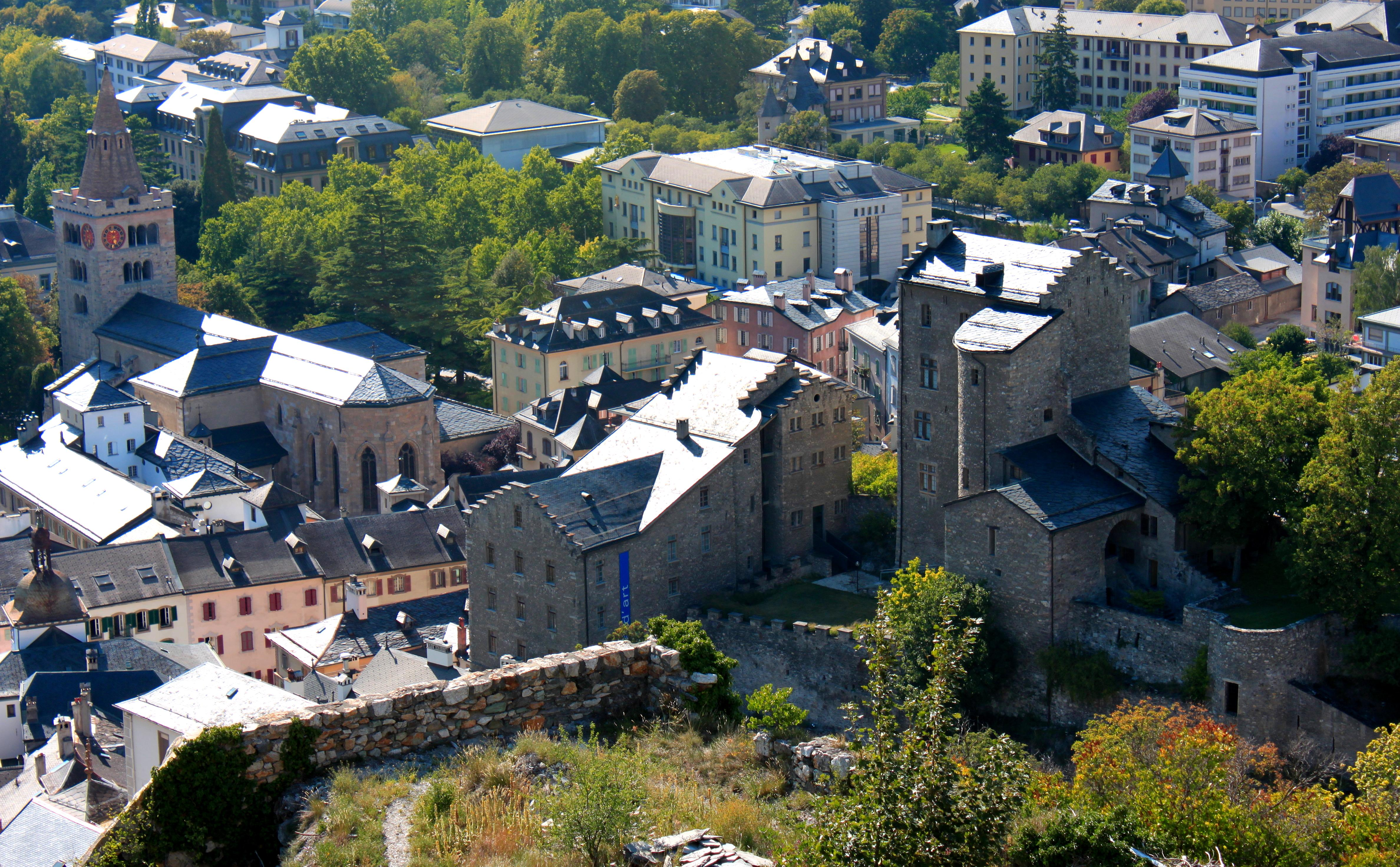 Suisse, canton du Valais, Sion, Château de la Majorie : ancienne demeure d’un officier épiscopal, date du 13e siècle. Ravagé à deux reprises par des incendies.